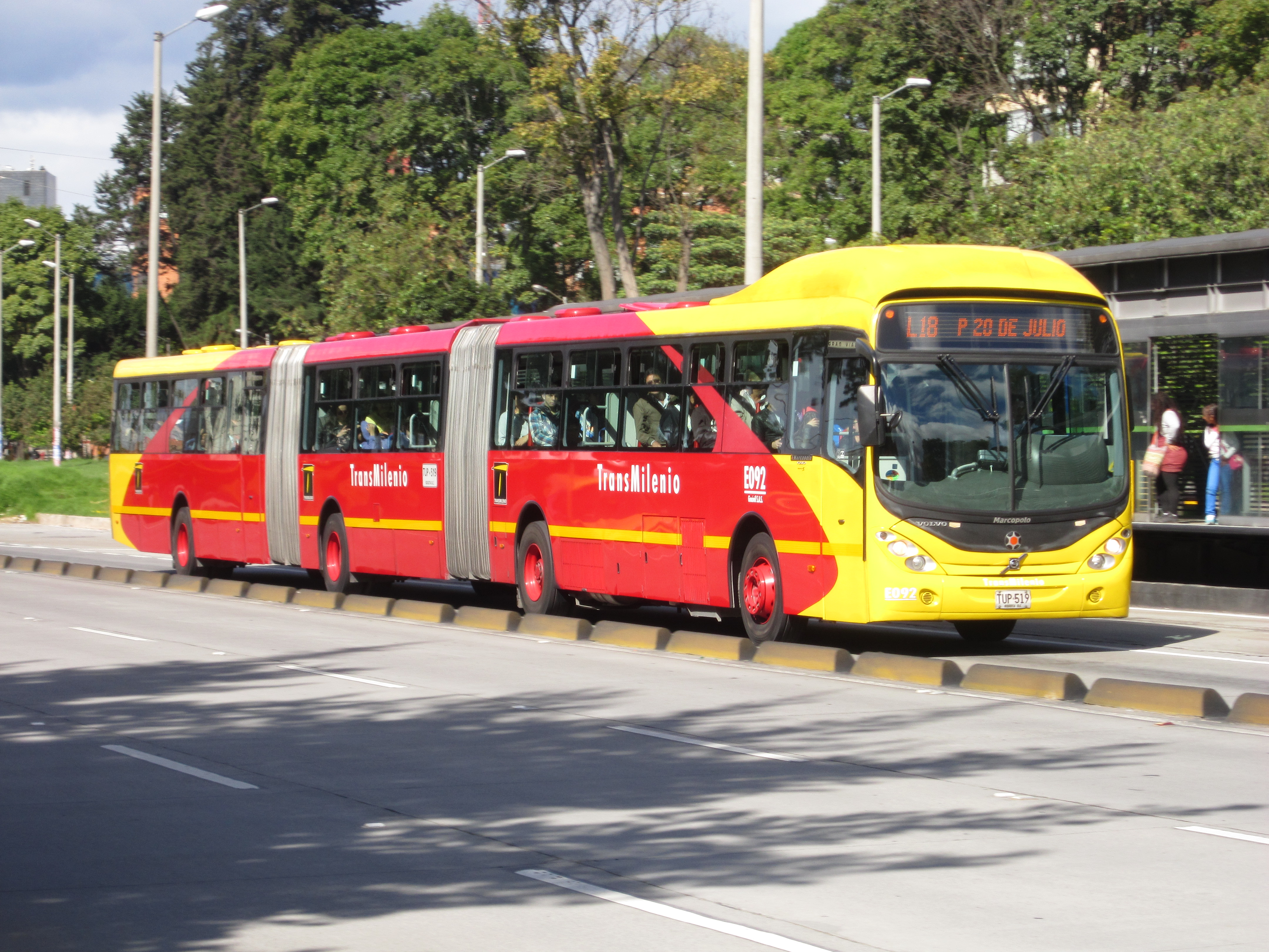 Bogota TransMilenio bus biarticulado por la Autopista Norte